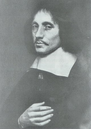 Willem Sluyter (Neede, 1627 - Zwolle, 1673)